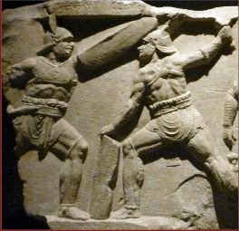 Relief Provocatores Tiber 1.Jh.